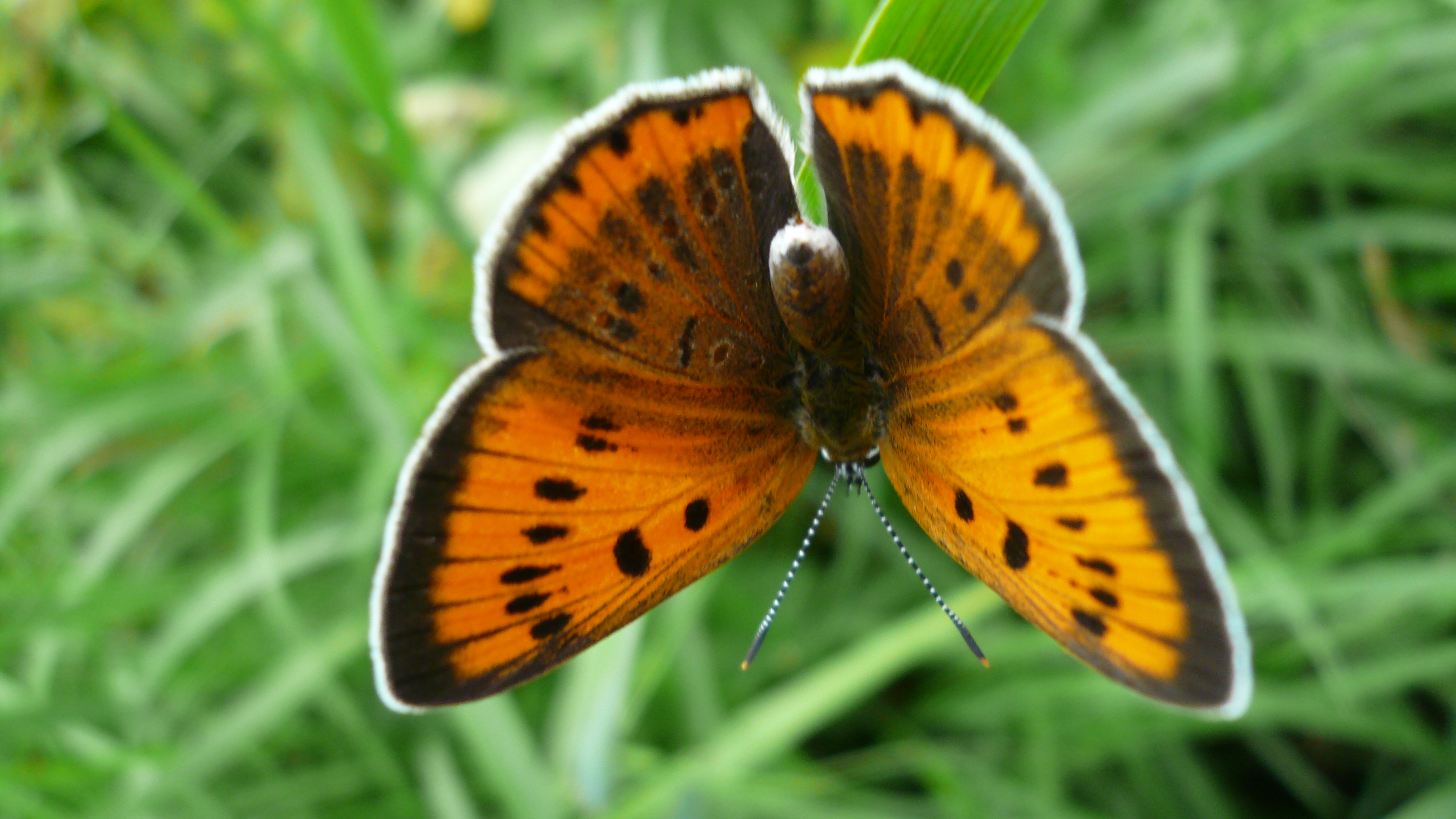 Samica czerwończyka nieparka. Warszawa-Bemowo